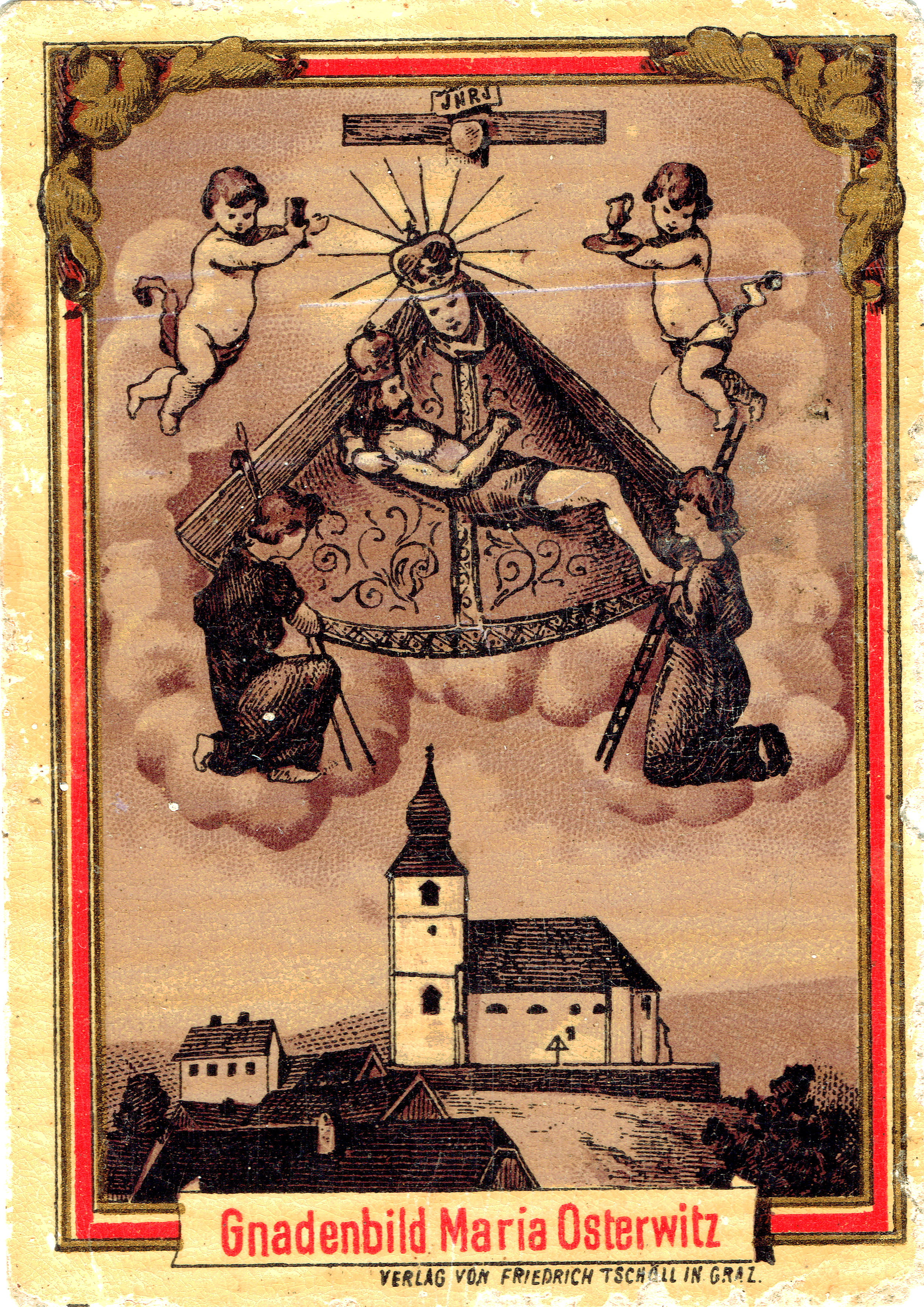 Andachtsbild mit Darstellung der Schmerzhaften Muttergottes und der Kirche von Osterwitz, Deutschlandsberg, Steiermark, Österreich